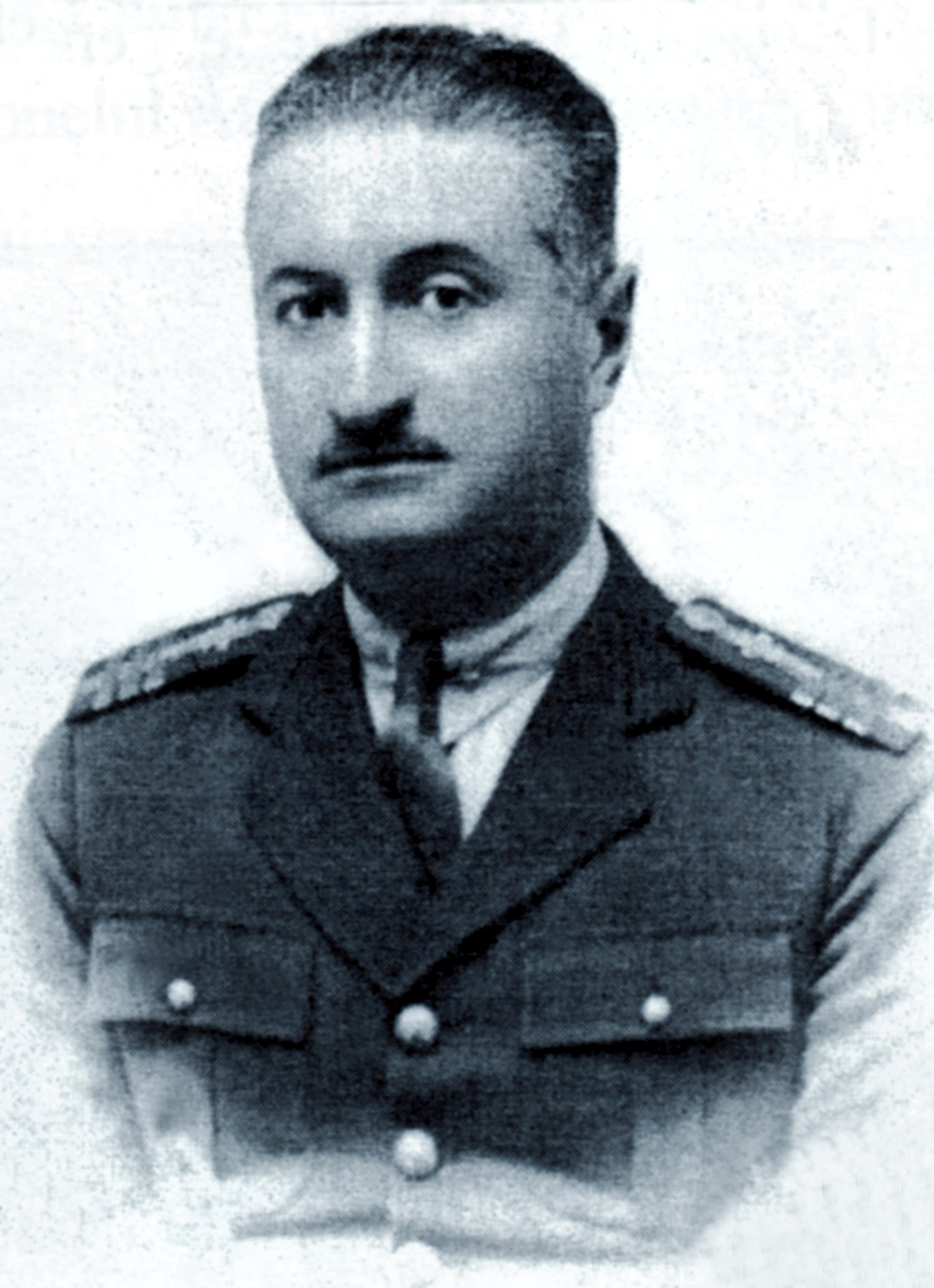 Aurel Racovitza als Oberst 1934